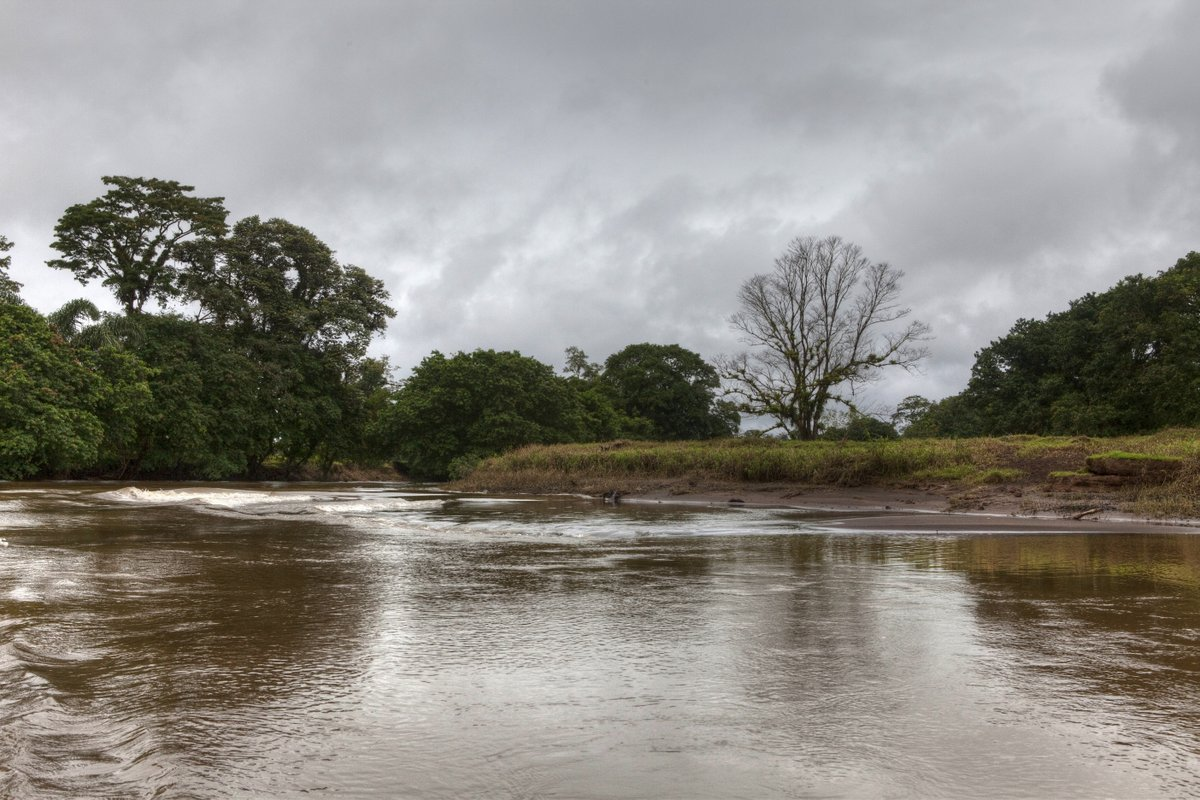 Es un río de Costa Rica nacido en las llanuras del Norte caribeño